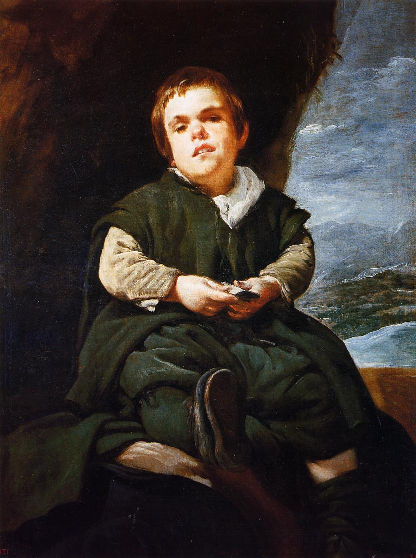 Retrato del bufón español Francisco Lezcano, que fue apodado El niño de Vallecas.